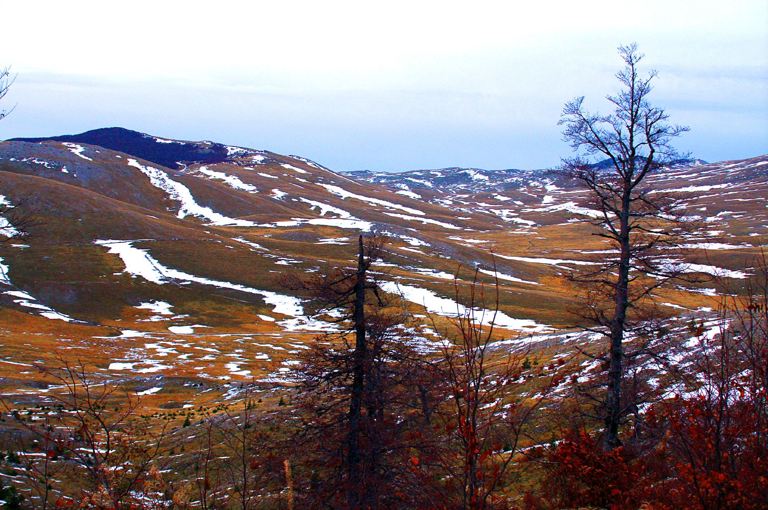 Walking to LukomirWalking to Lukomir 2]